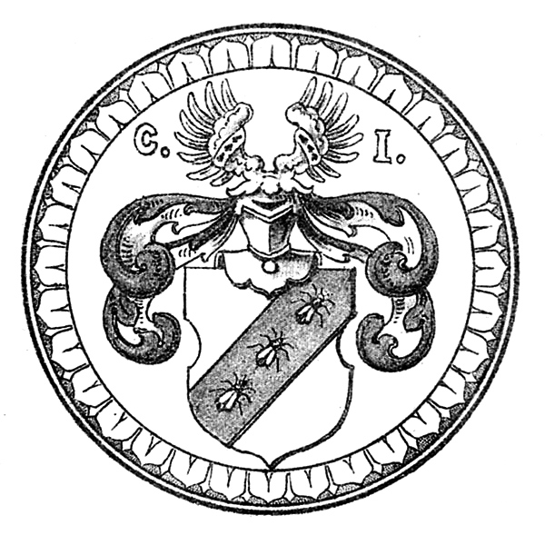 Wappen der Heilbronner Patrizier Imlin